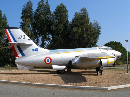 Vautour IIN conservé à la Base Aérienne 126 de Solenzara (Corse, France)